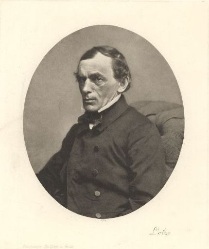 a) 8024 [gedr.] b) Photographische Gesellschaft in Berlin [gedr.] c) Lotze [gedr.] d) Photographische Gesellschaft Berlin [Blindstempel]